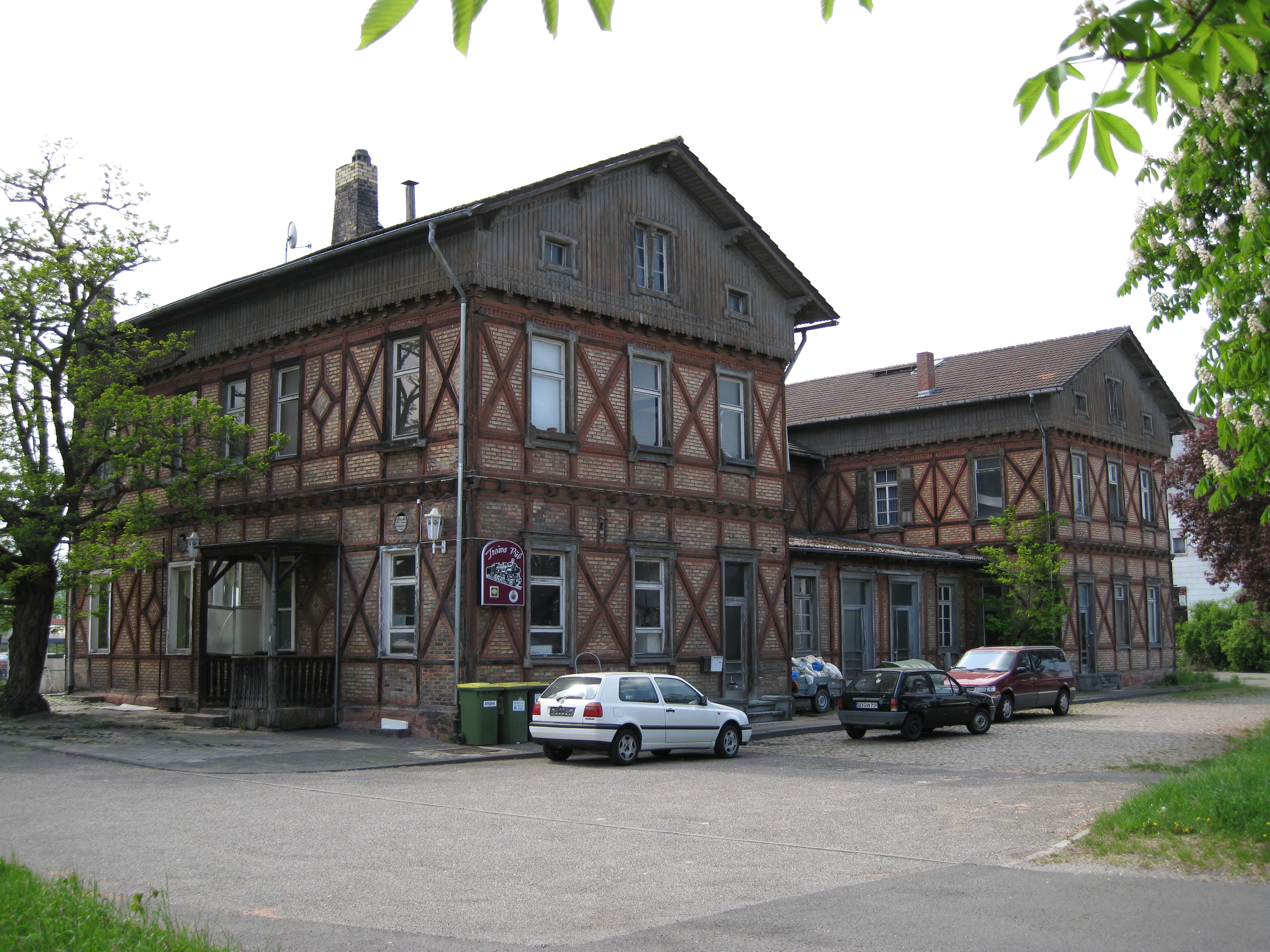 Alter Bahnhof Germersheim Deutschland